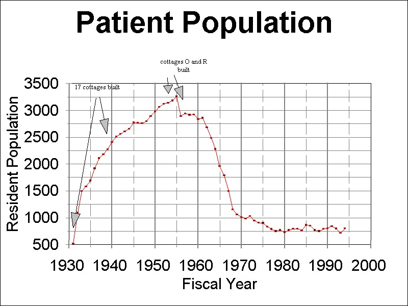 histoire de l'hôpital psychiatrique de Marlboro